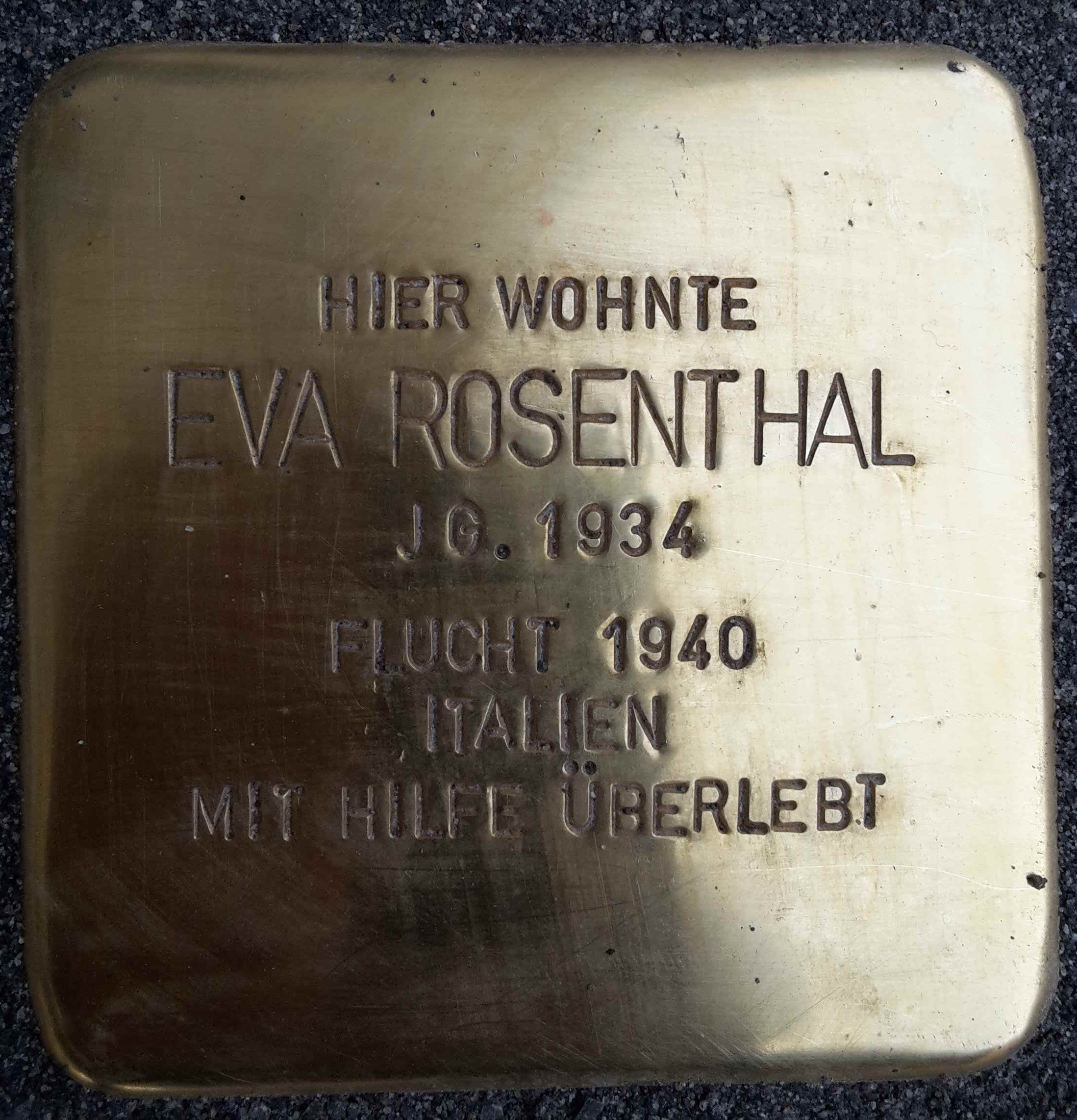 Stolperstein für Eva Rosenthal in Neu-Ulm